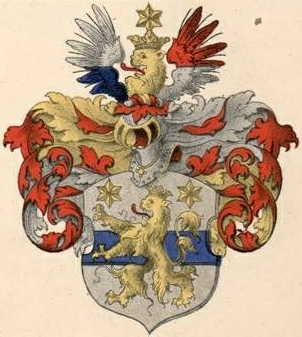 Löwensterni suguvõsa aadlivapp